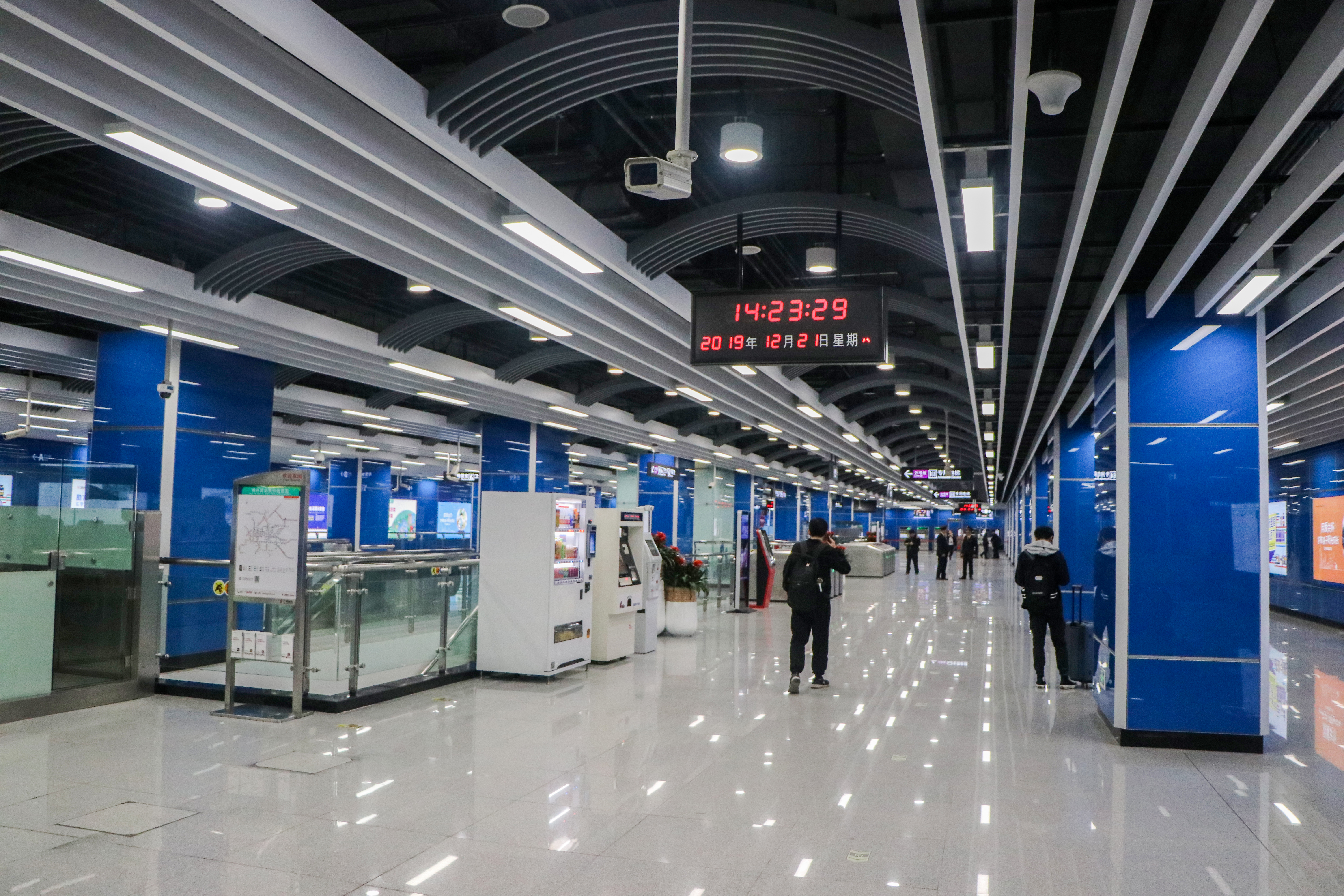 广州地铁神舟路站